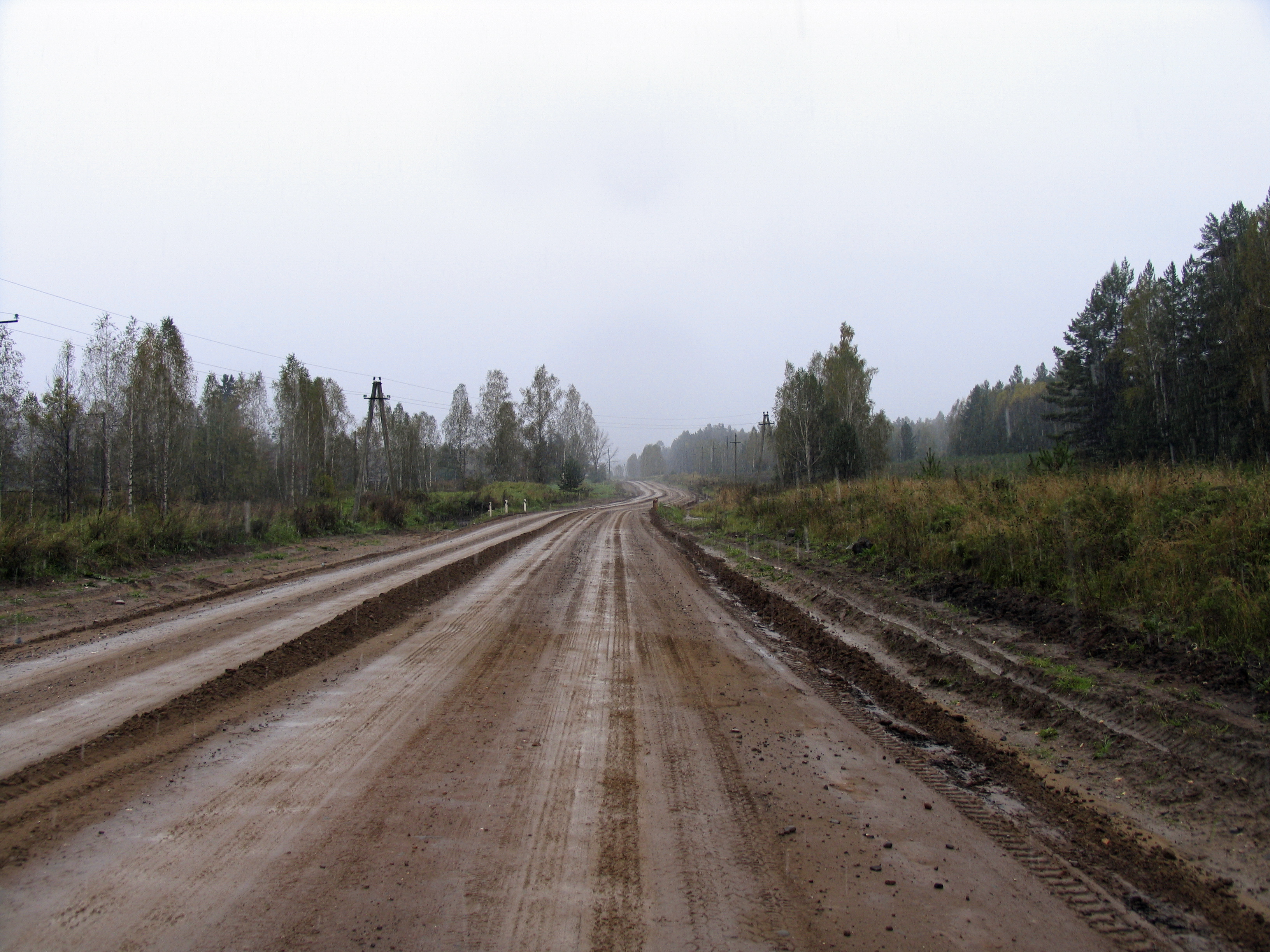 Федеральная трасса "Байкал". Участок Красноярск - Иркутск. Район Тайшета. Federal route "Baykal". Section Irkutsk - Krasnoyarsk. Taysheta region